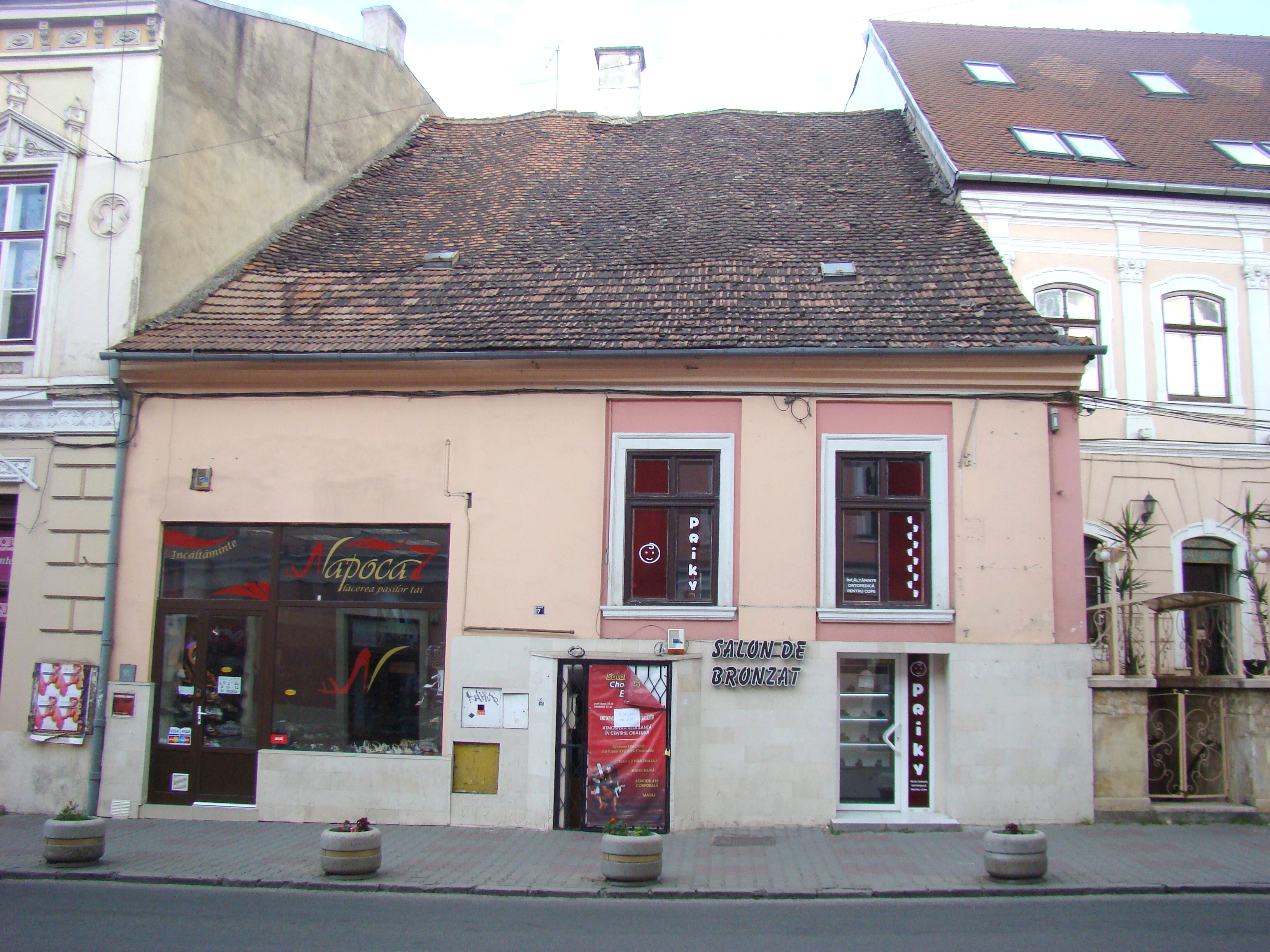 Casă monument istoric, str.Napoca, nr.7